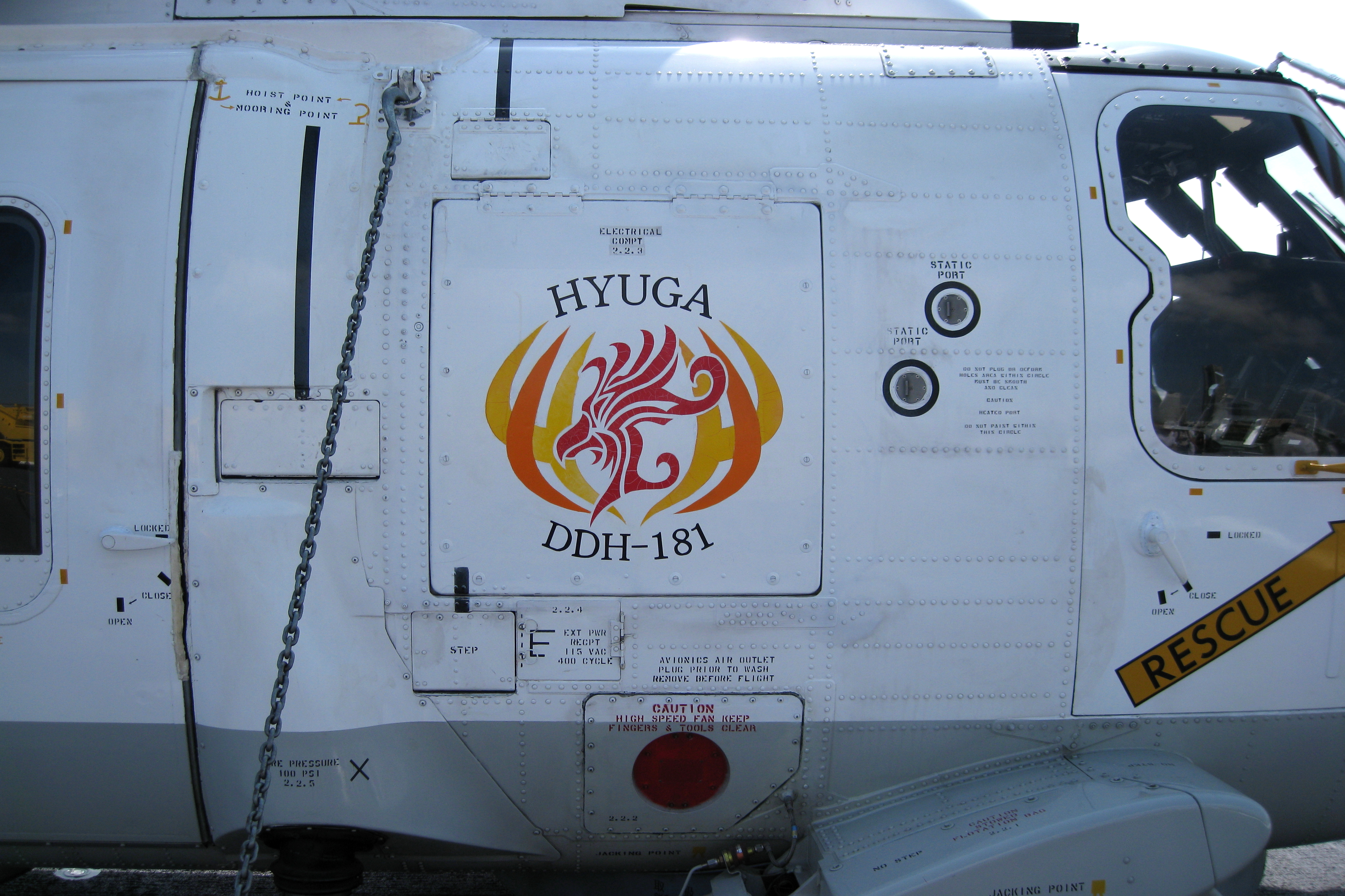 海上自衛隊の護衛艦ひゅうが。 用途廃止になり機体番号の代わりにひゅうがのロゴマークが描かれたSH-60J